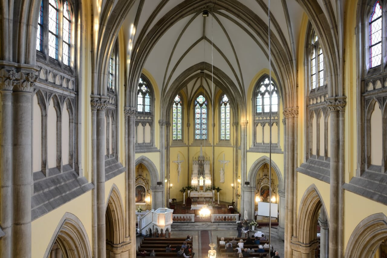 Pohled skrze hlavní loď kostela na východní závěr s oltářem. Po stranách se nachází nad arkádami triforia a nad nimi gotická okna zdobená kružbou.